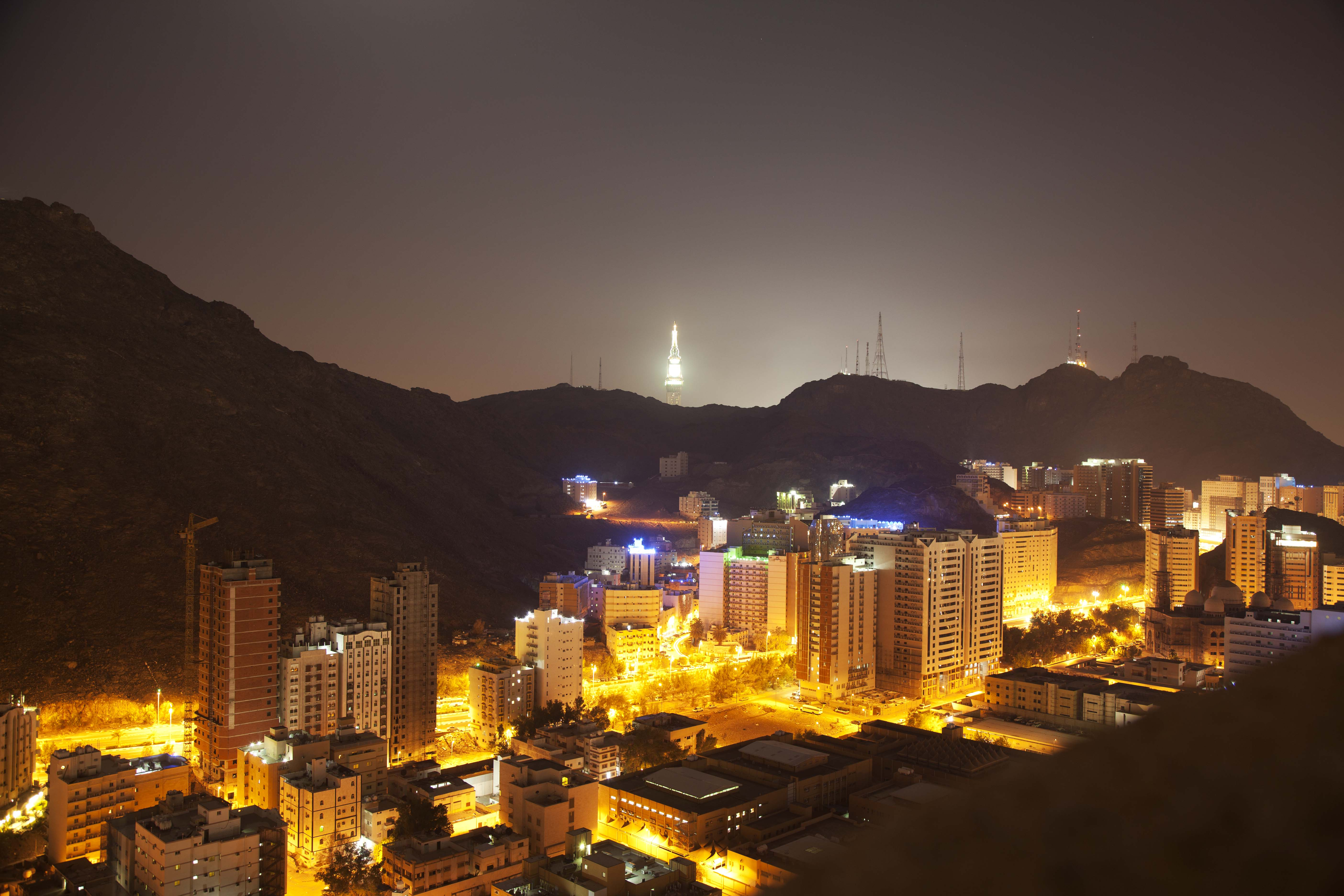 Al Aziziyah, Mecca, Saudi Arabia